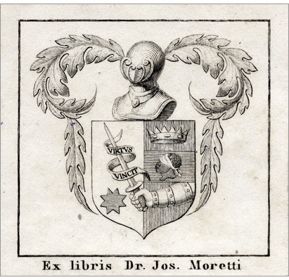 Ex libris di Giuseppe Moretti, 51mm x 50mm, 1810